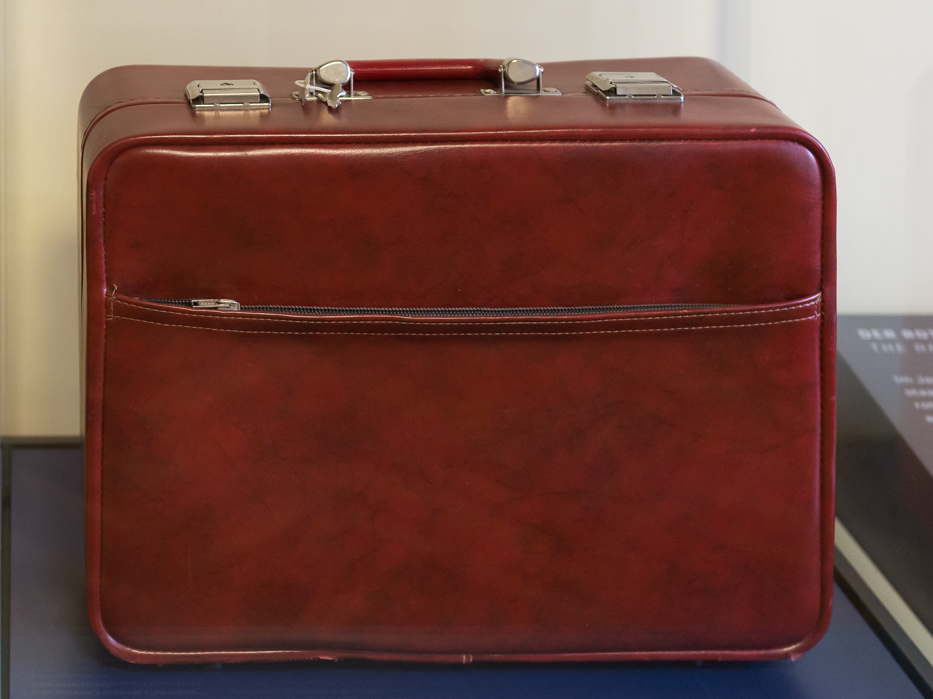 Erich Mielkes roter Kunstlederkoffer, ausgestellt in der Forschungs- und Gedenkstätte Normannenstraße in Berlin.Ausstellungstext:Tafel 1: Der rote KofferIm Januar 1990 beschlagnahmte der Militärstaatsanwalt in den Räumen von Haus 1 einen roten Kunstlederkoffer. Er enthielt Justizakten aus der Zeit des Nationalsozialismus aus einem Verfahren gegen Erich Honecker und andere KPD-Mitglieder. Im Koffer fanden sich zwei schriftliche Auswertungen dieser Akten, die offenbar durch das MfS angefertigt worden waren. Eines der Schriftstücke kommt zu einer belastenden Bewertung des Aussageverhaltens Honeckers bei der Gestapo.Tafel 2 (auf der ein Foto abgebildet ist, das einen hellblauen, zweiflügeligen Stahlschrank zeigt, der in einer Holzschrankwand eingebaut ist. Die vier Schranktüren sind geöffnet, im Stahlschrank befinden drei Regalböden und oben zwei abschließbare Fächer, deren Türen ebenfalls offenstehen. Neben zahlreichen Aktenordnern, Schreibblöcken und Papierstapeln liegt unten rechts der rote Kunstlederkoffer): Dieses Foto entstand während der Durchsuchung der Minister-Etage im Januar 1990 durch den Militärstaatsanwalt. Wo genau der Koffer aufbewahrt wurde, ist nach wie vor unklar. Dem Protokoll zufolge scheint er im Januar 1990 im Büro von Hans Carlsohn, dem "persönlichen Referenten" Erich Mielkes, beschlagnahmt worden zu sein.